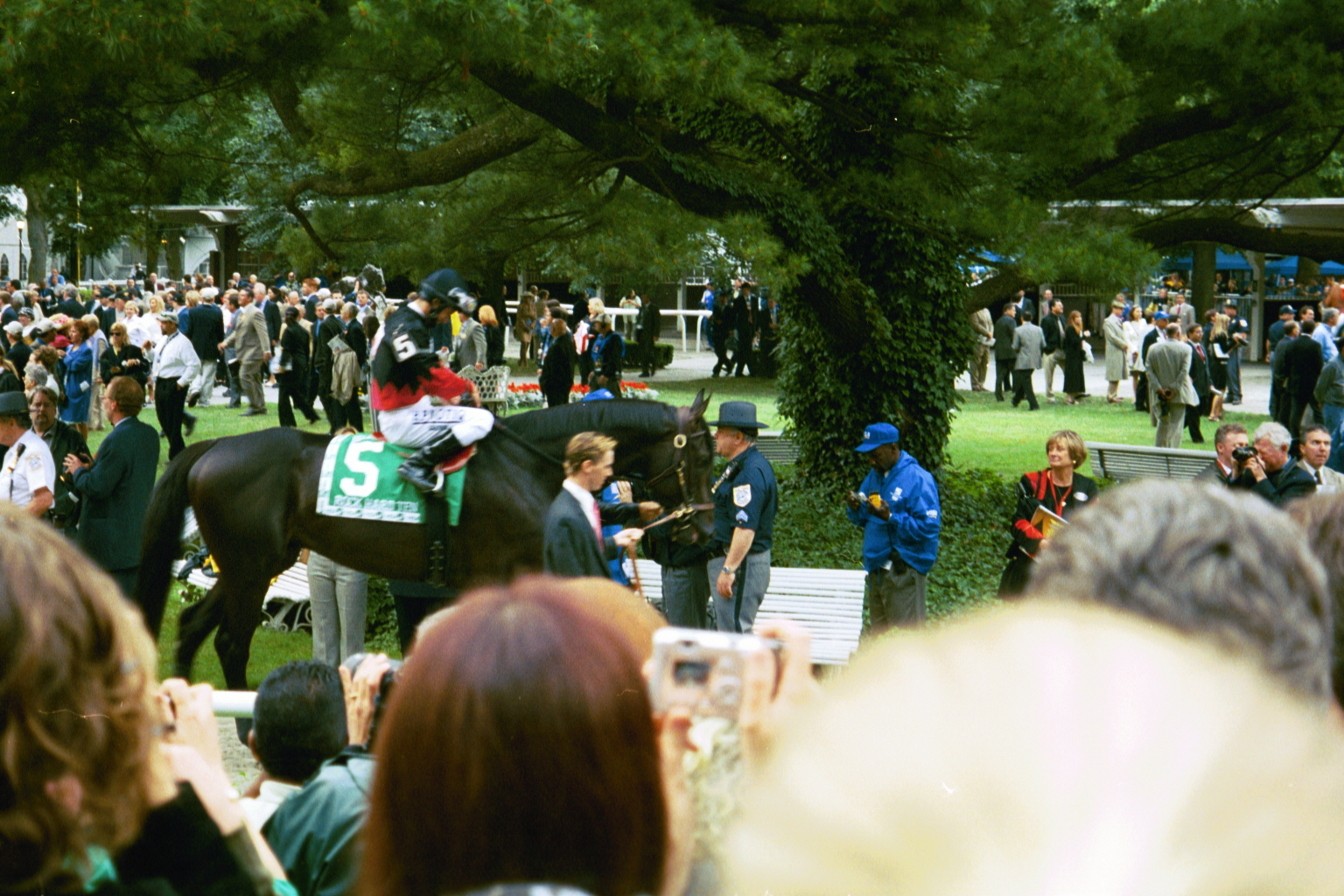 Rock Hard Ten at 2004 Belmont Stakes.